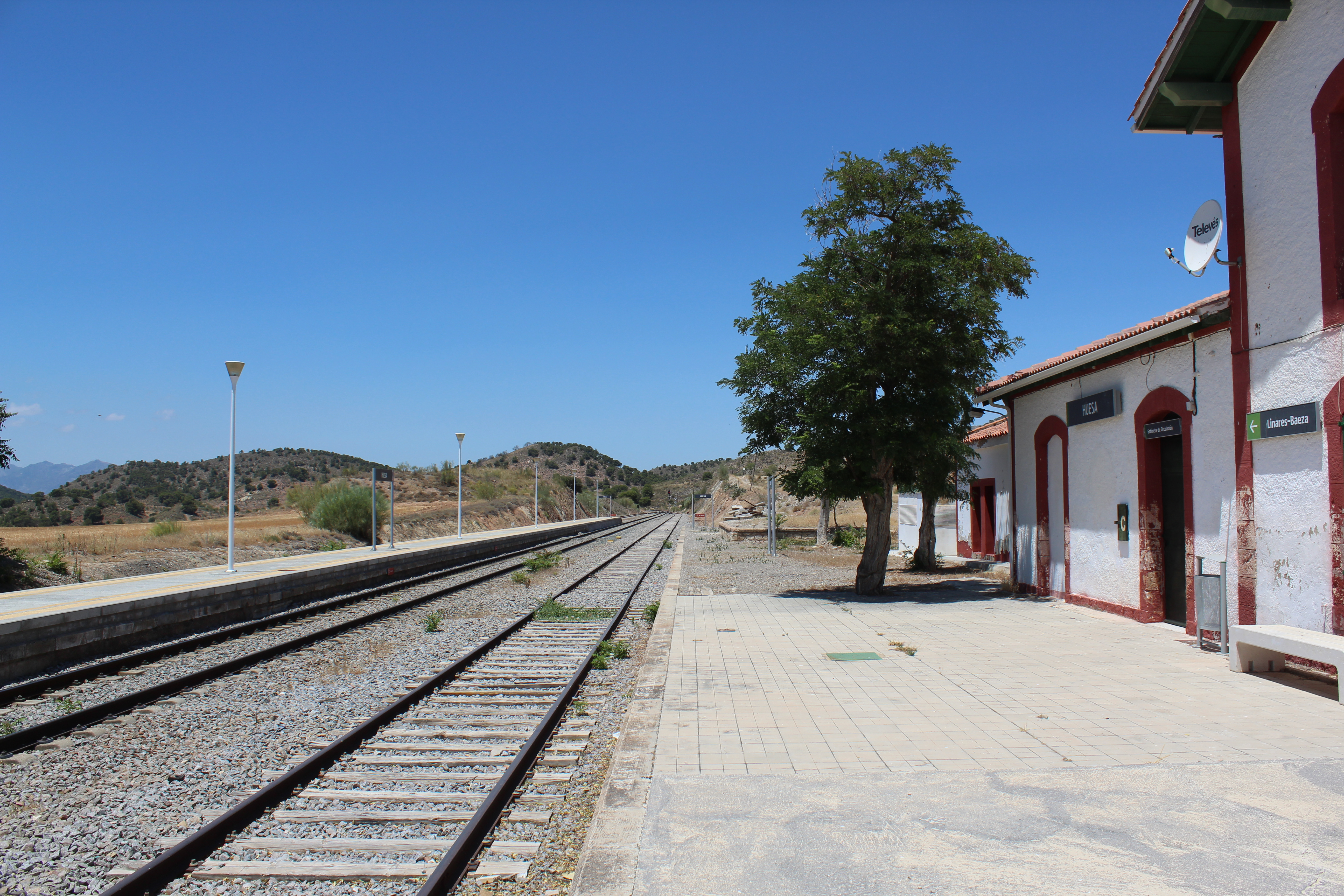 Vías y apeadero de la Estación de Huesa.